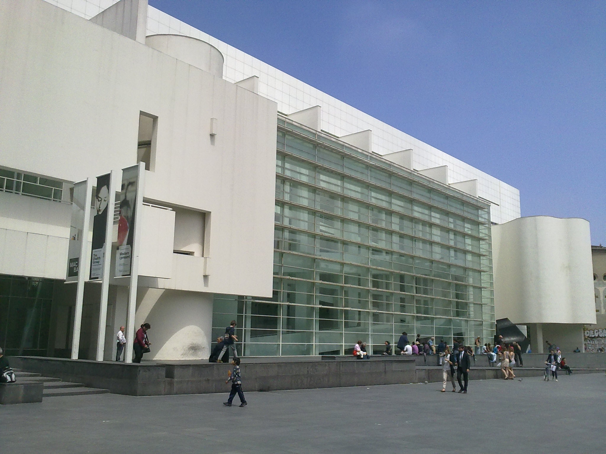 MACBA, facana. Barcelona.